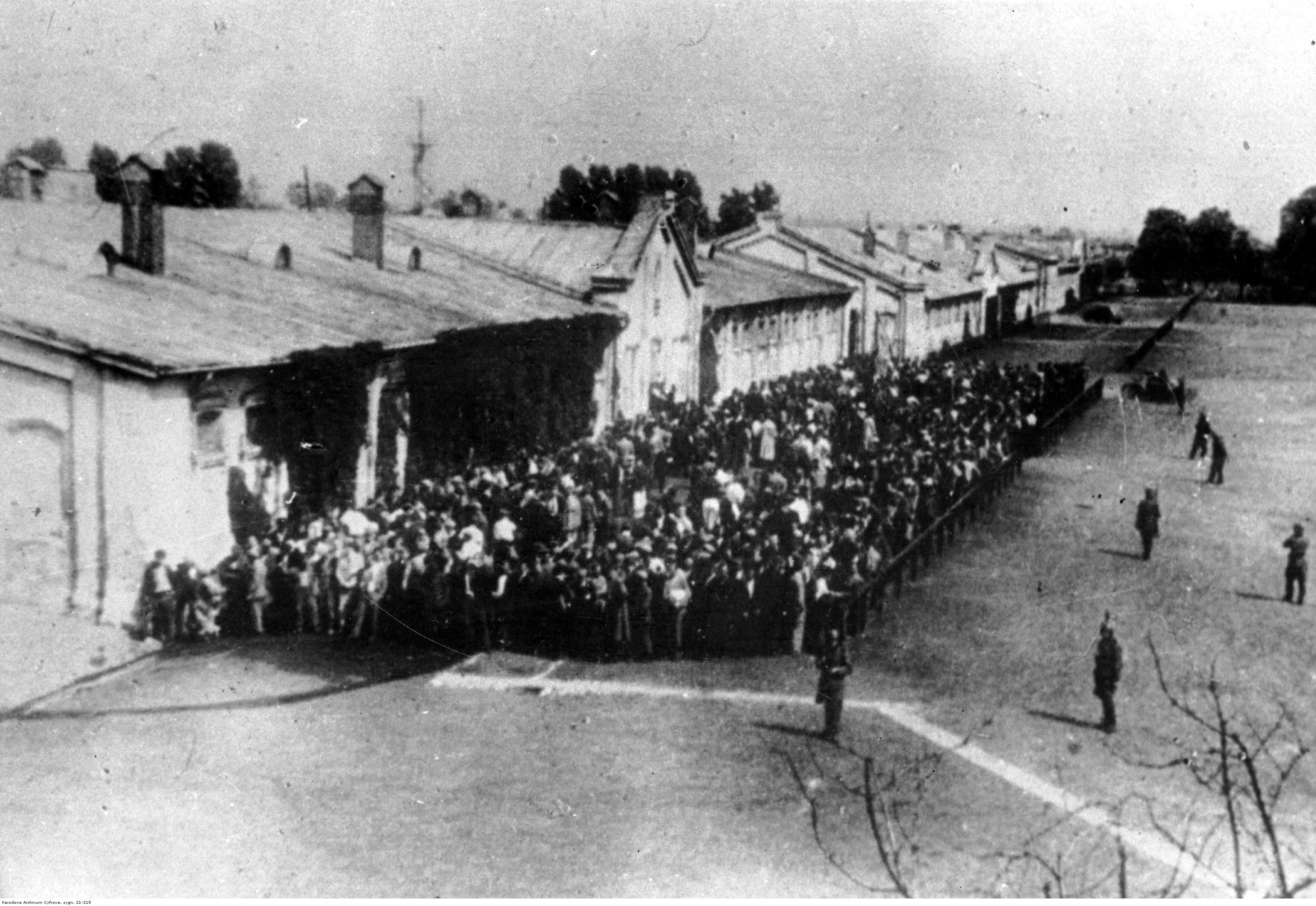 Koszary 1. Pułku Szwoleżerów Józefa Piłsudskiego w Warszawie. Tłum ludzi na placu przed budynkami.